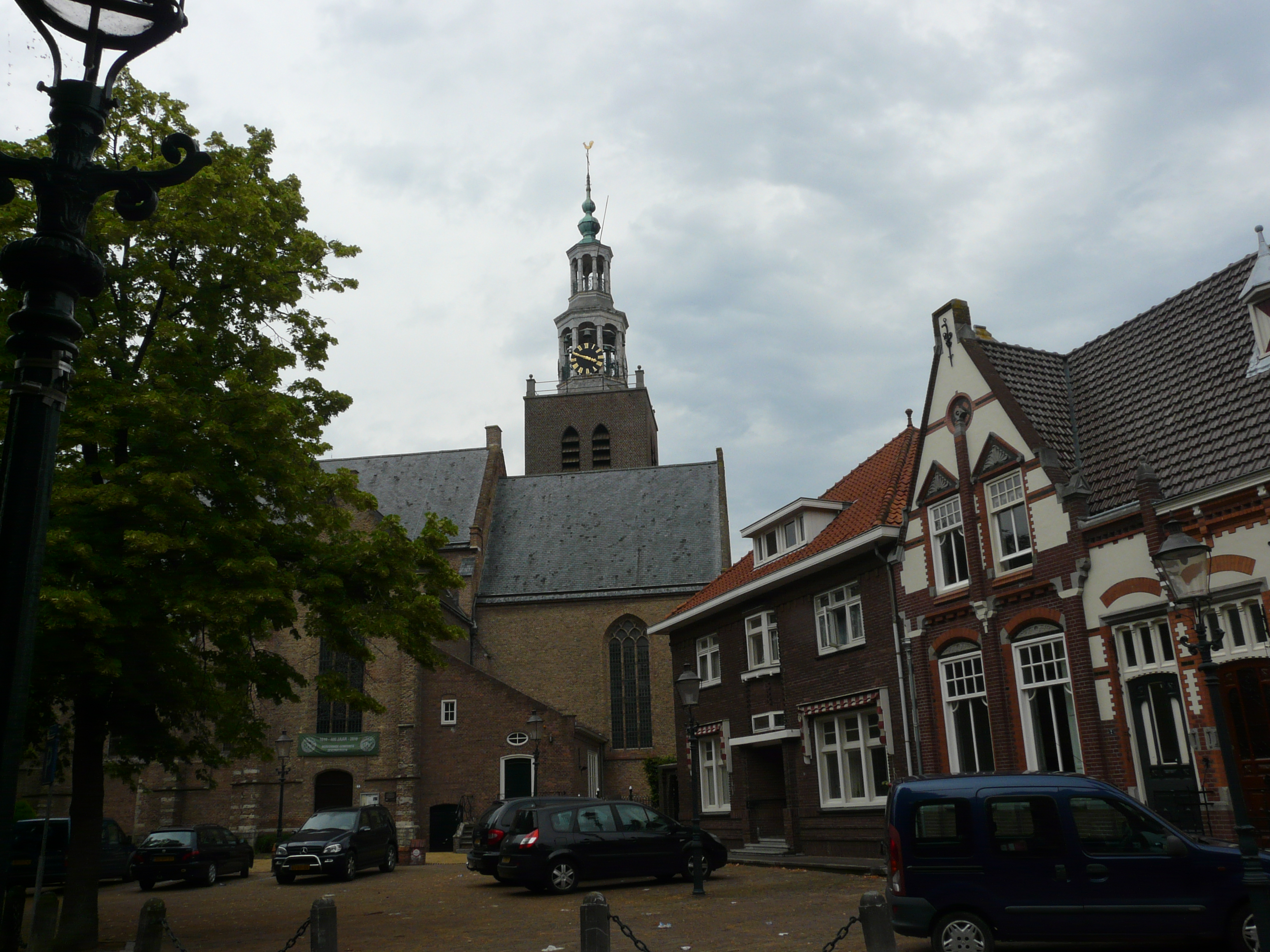 St. Catharinakerk in Zevenbergen